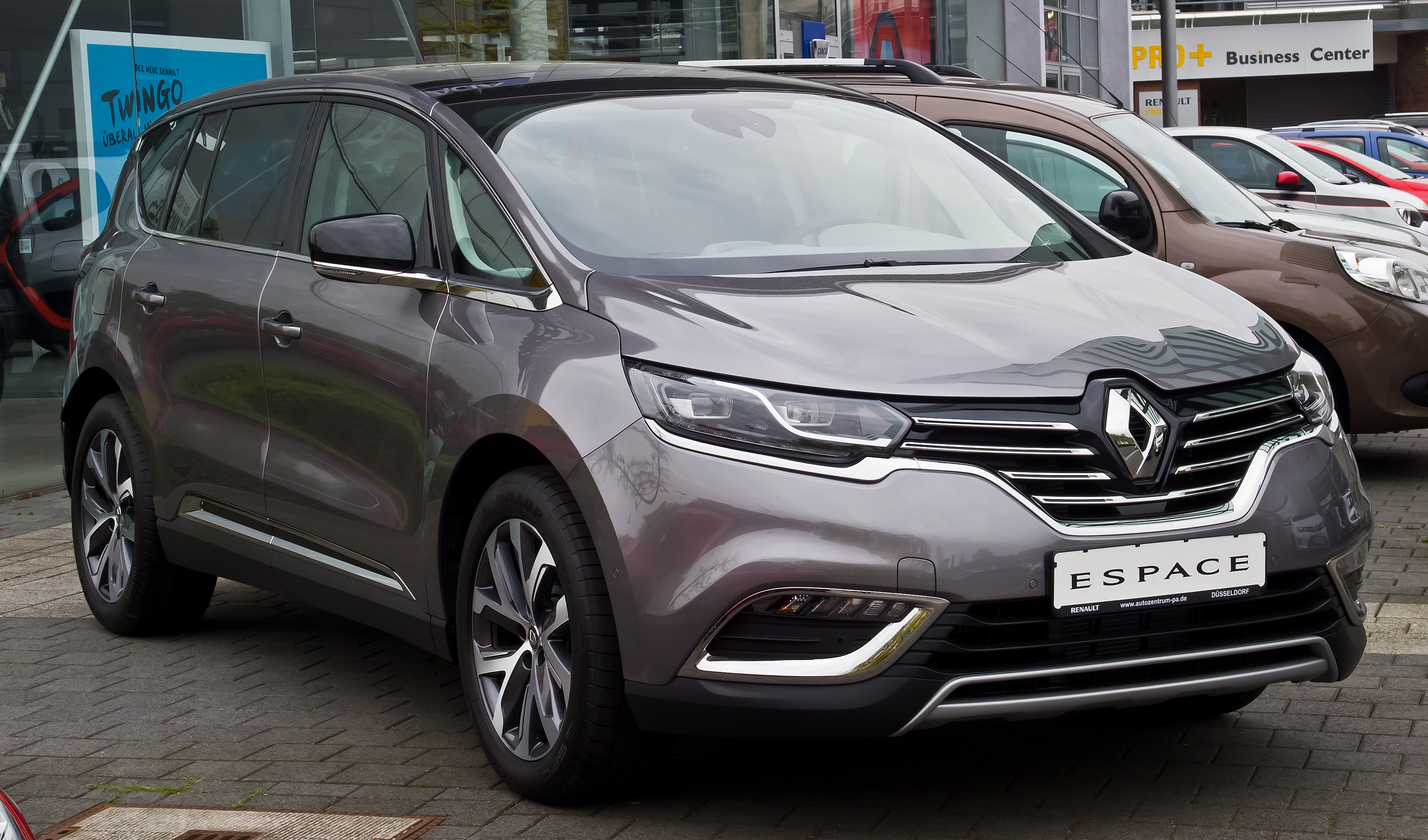 Renault Espace Intens ENERGY dCi 160 EDC (V)